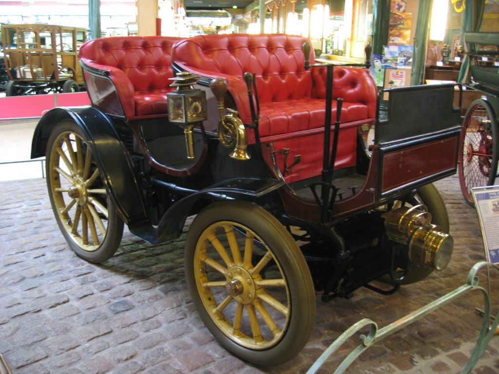 Peugeot Type 15, exposée au Musée de l'aventure Peugeot-Sochaux, en France.